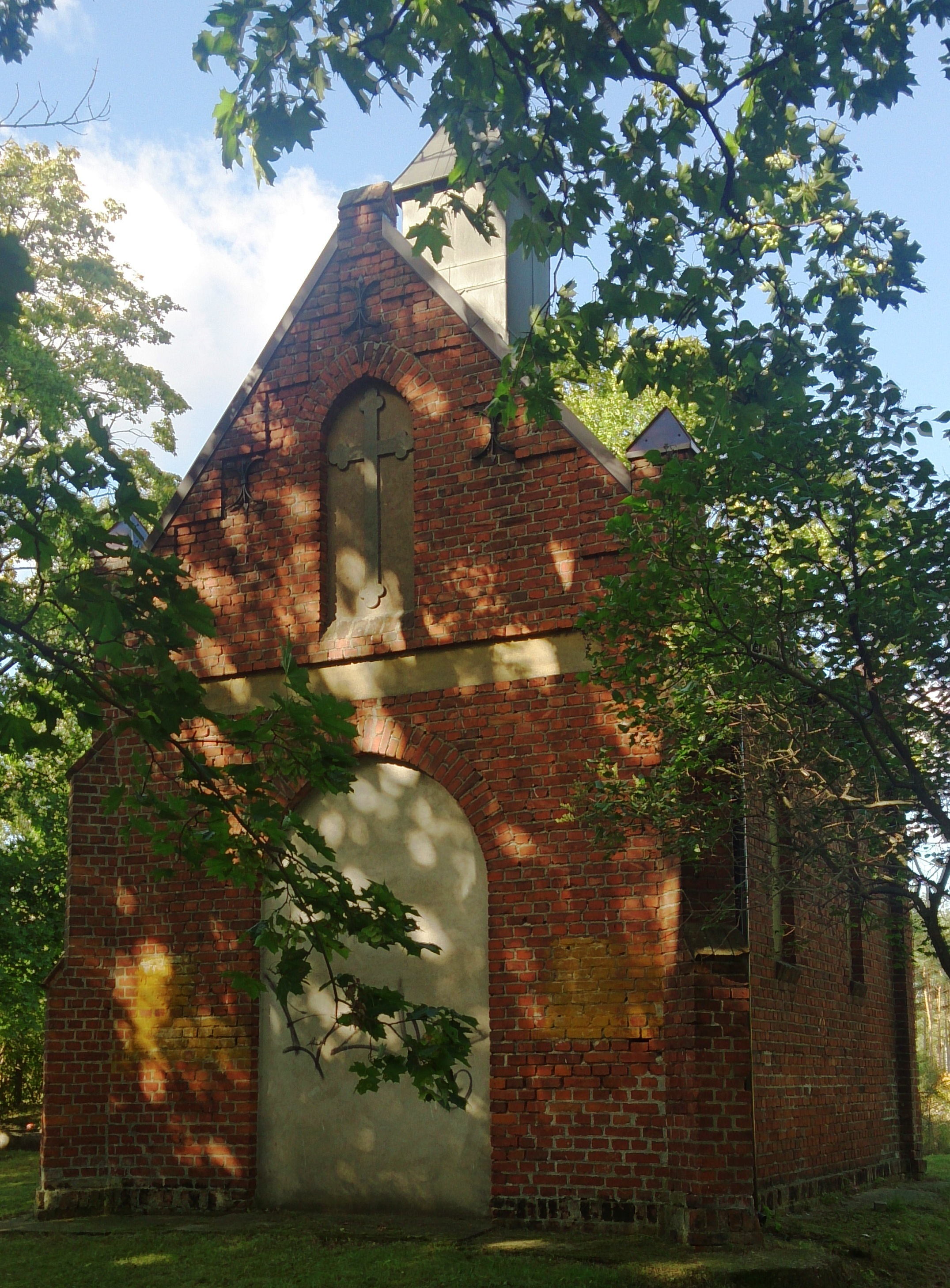 Dajtki: kaplicą pod wezwaniem świętego Jana Nepomucena z roku 1909 na cmentarzu rzymskokatolickim z drugiej połowy XIX wieku.